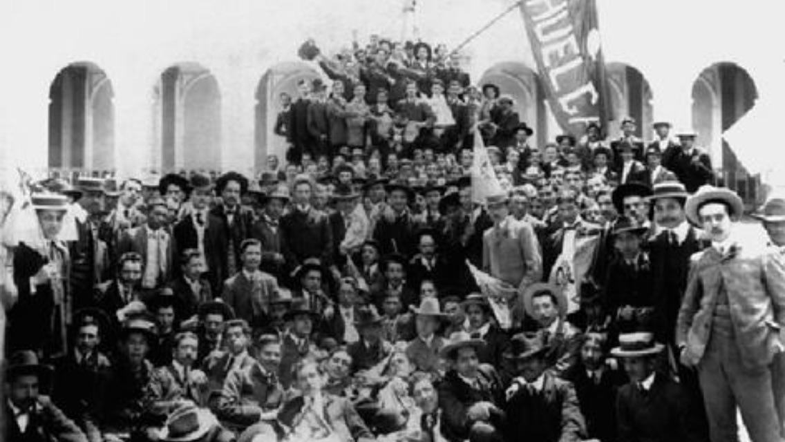 Huelga de dolores en los años 20.